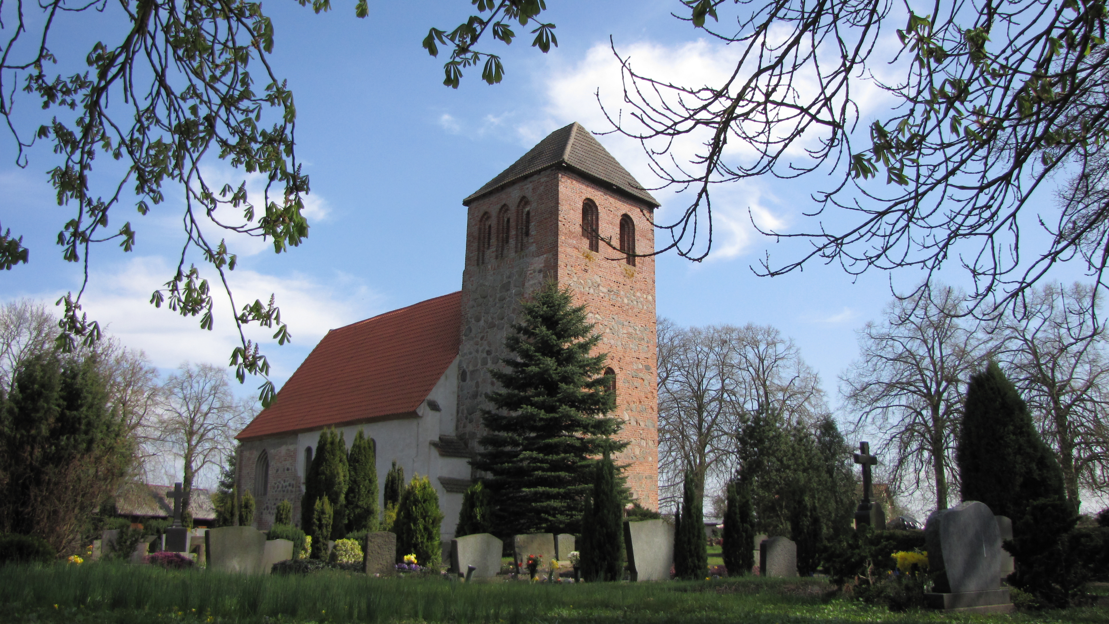 Dorfkirche Beggerow